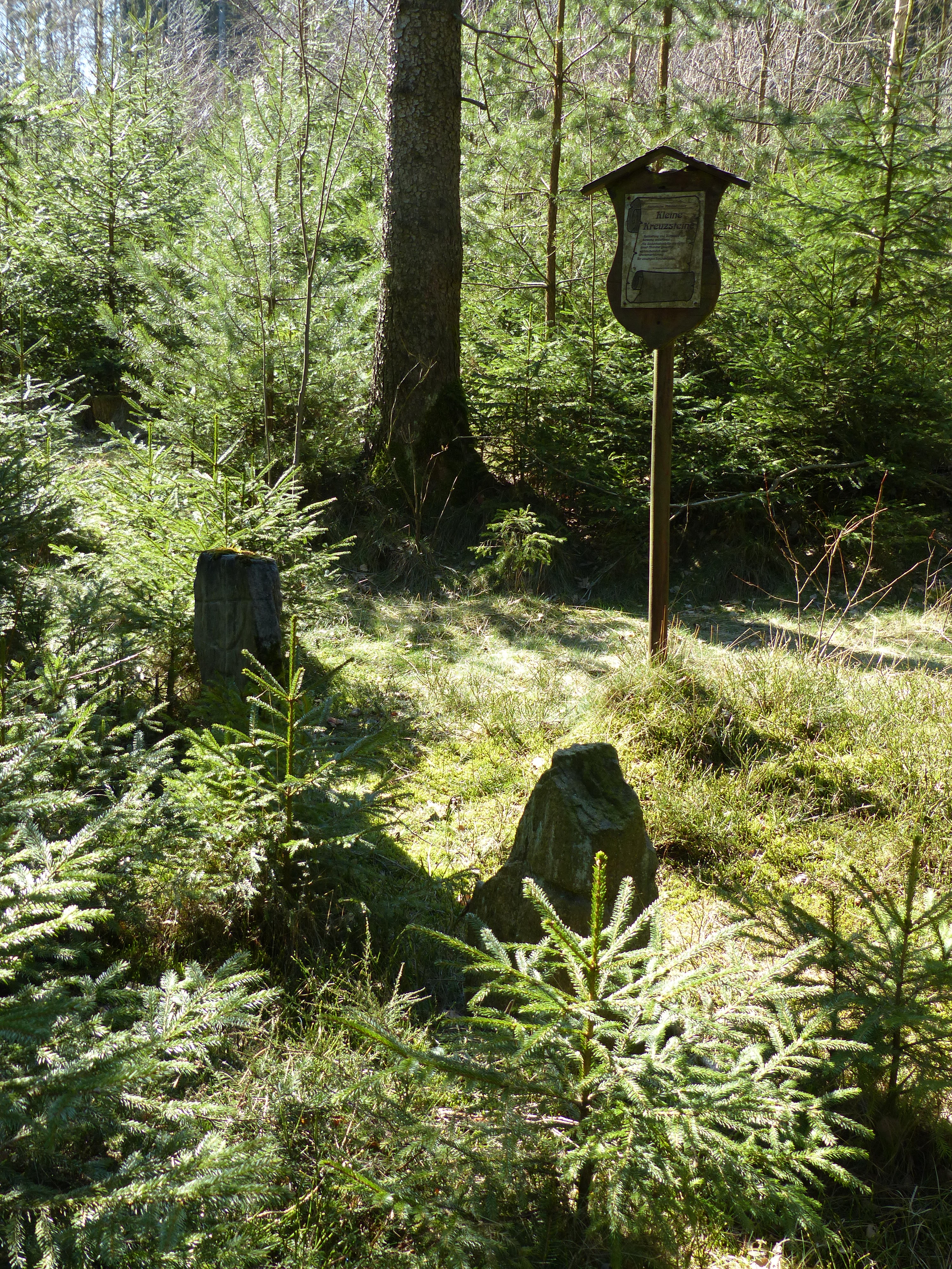 Bauwerke und Baudenkmäler in Schönwald